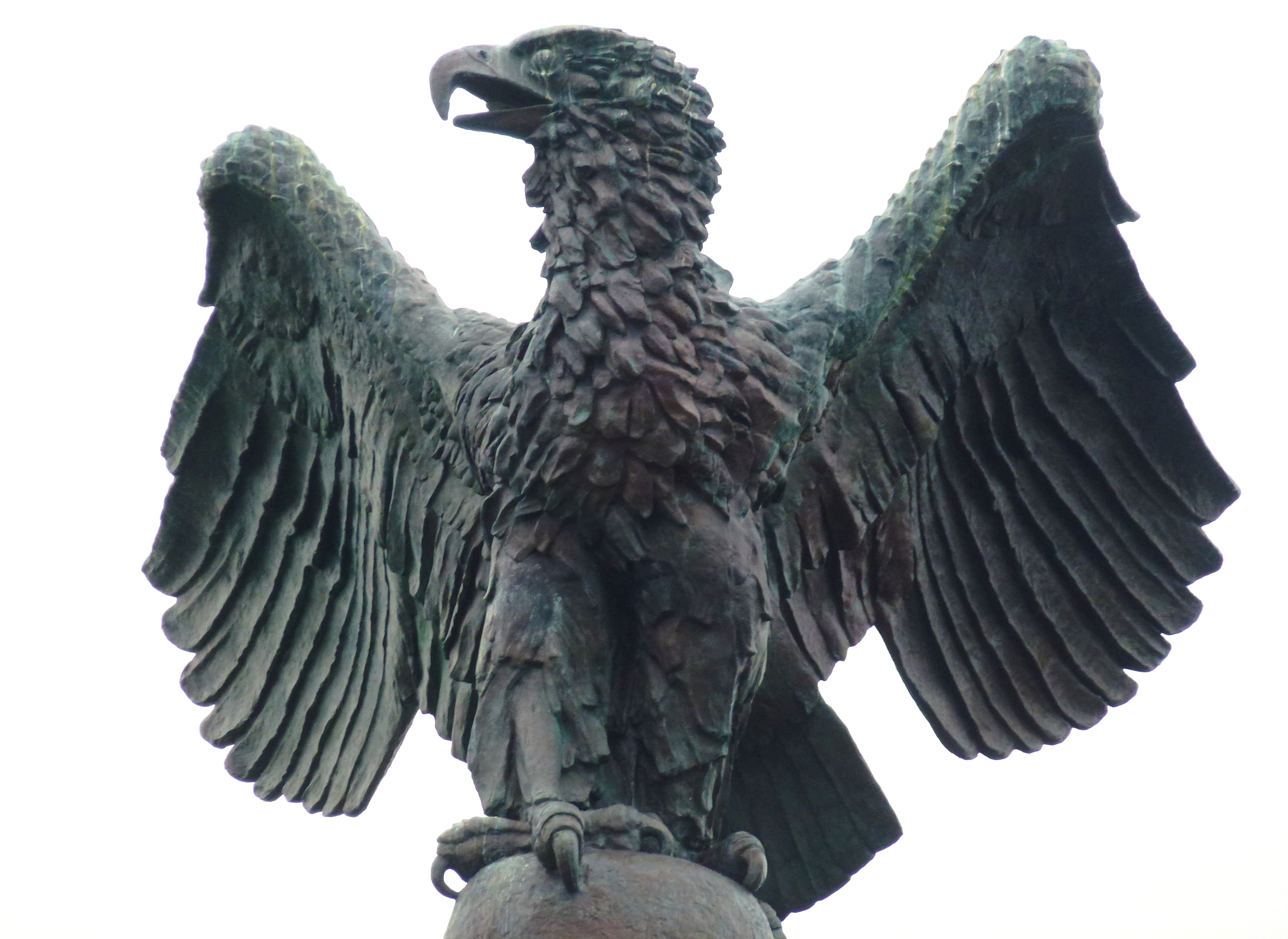 U-Boot-Ehrenmal Möltenort, Adler